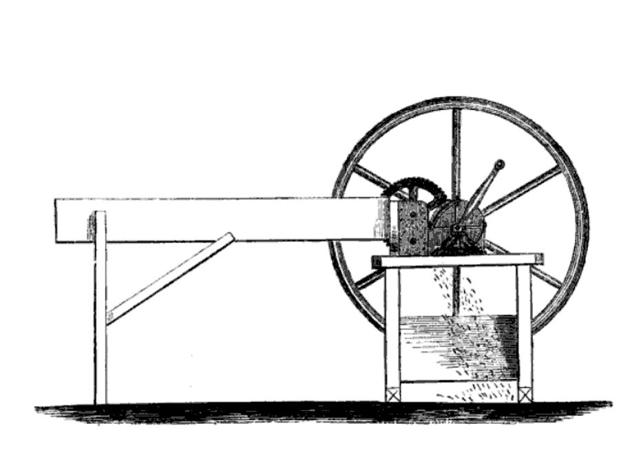 Strosnijder